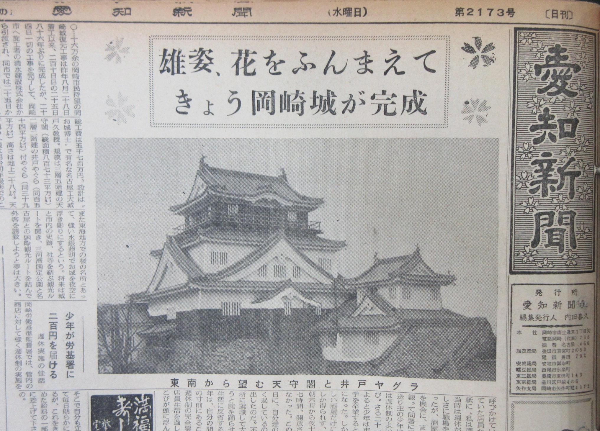 『愛知新聞』1959年3月25日。岡崎城復元工事完成を伝える記事。